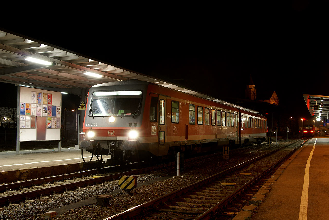 629 344 als Regionalexpress am 2006-12-28 abends in Heidenheim (Brenz).